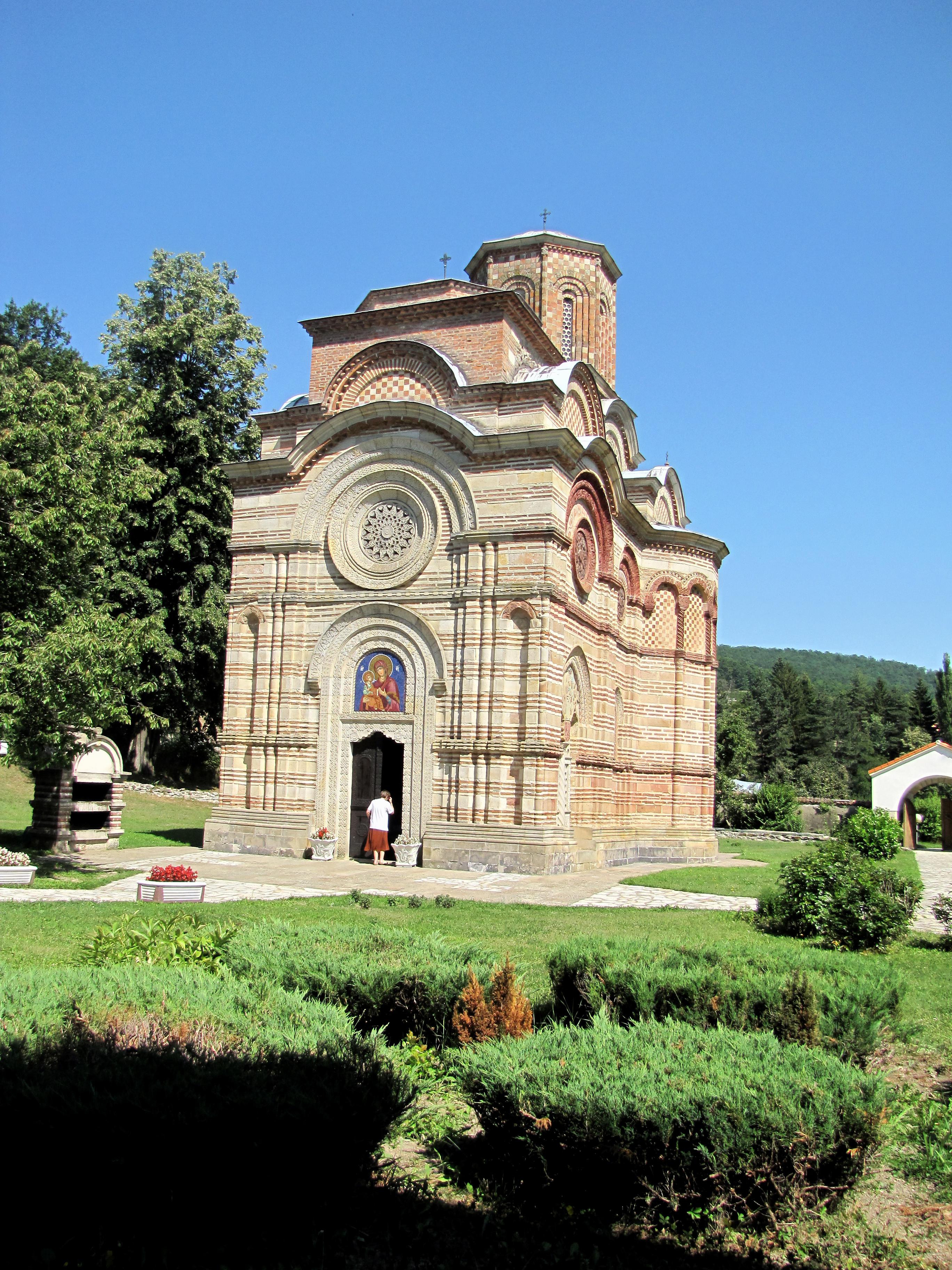 Храм посвећен Ваведењу Пресвете Богородице, Ктитор је достојанственик са двора деспота Стефана Лазаревића, по имену Богдан, са супругом Милицом и братом Петром, али се често говори да је ово деспотова задужбина, Храм се сматра најраскошнијом црквеном грађевином моравског стила, Подигнут је у периоду од 1407, до 1413. године, У турским пописима помиње се као Манастир Пречисте у Левчу, Не зна се када је запустео због турских зулума, Обновили су га монаси манастира Мораче, Страдао је више пута у доба буна и устанака